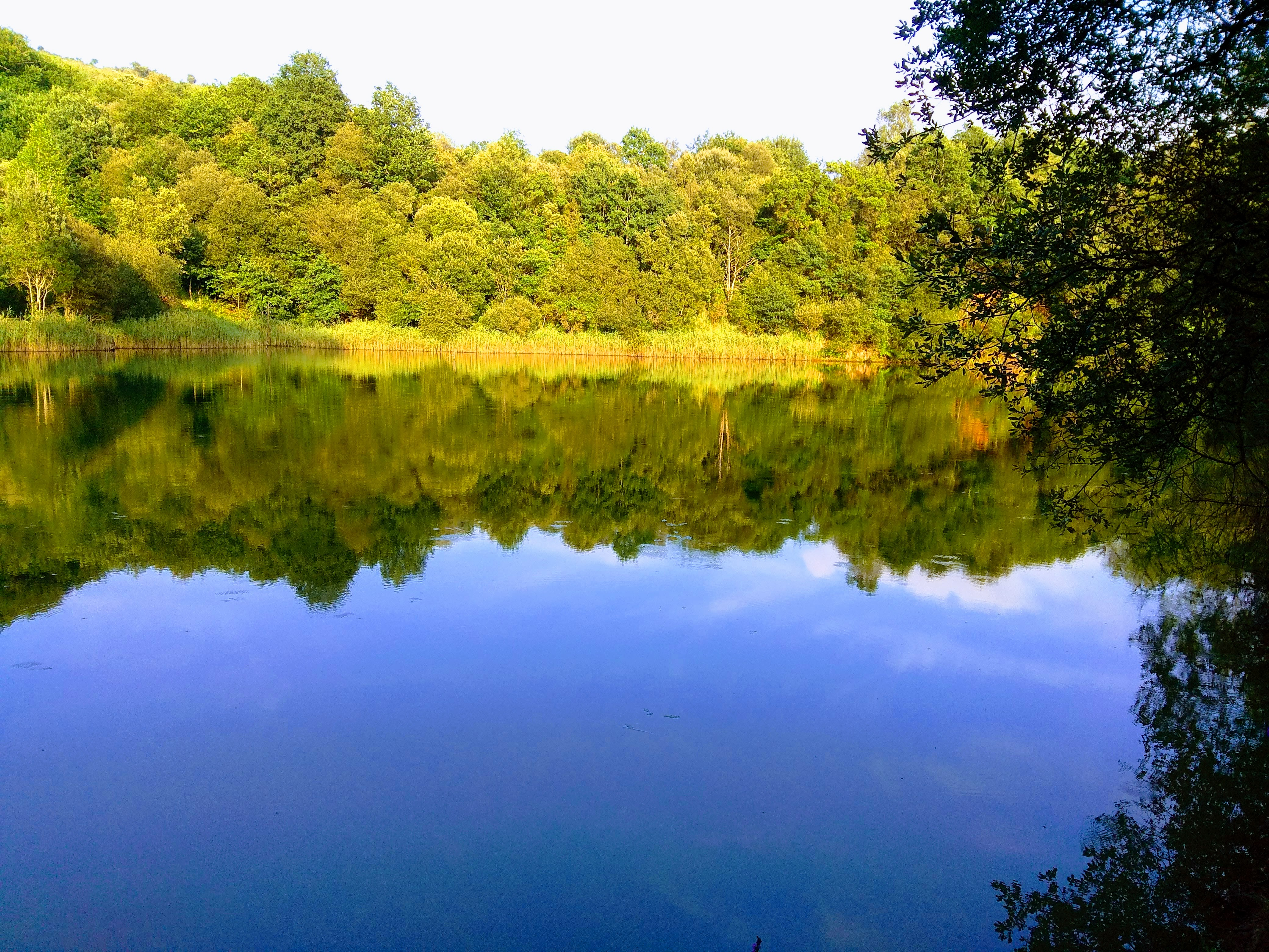 Laguna superior de los Pozos de Valcaba, en el municipio de Liérganes, Cantabria (España)